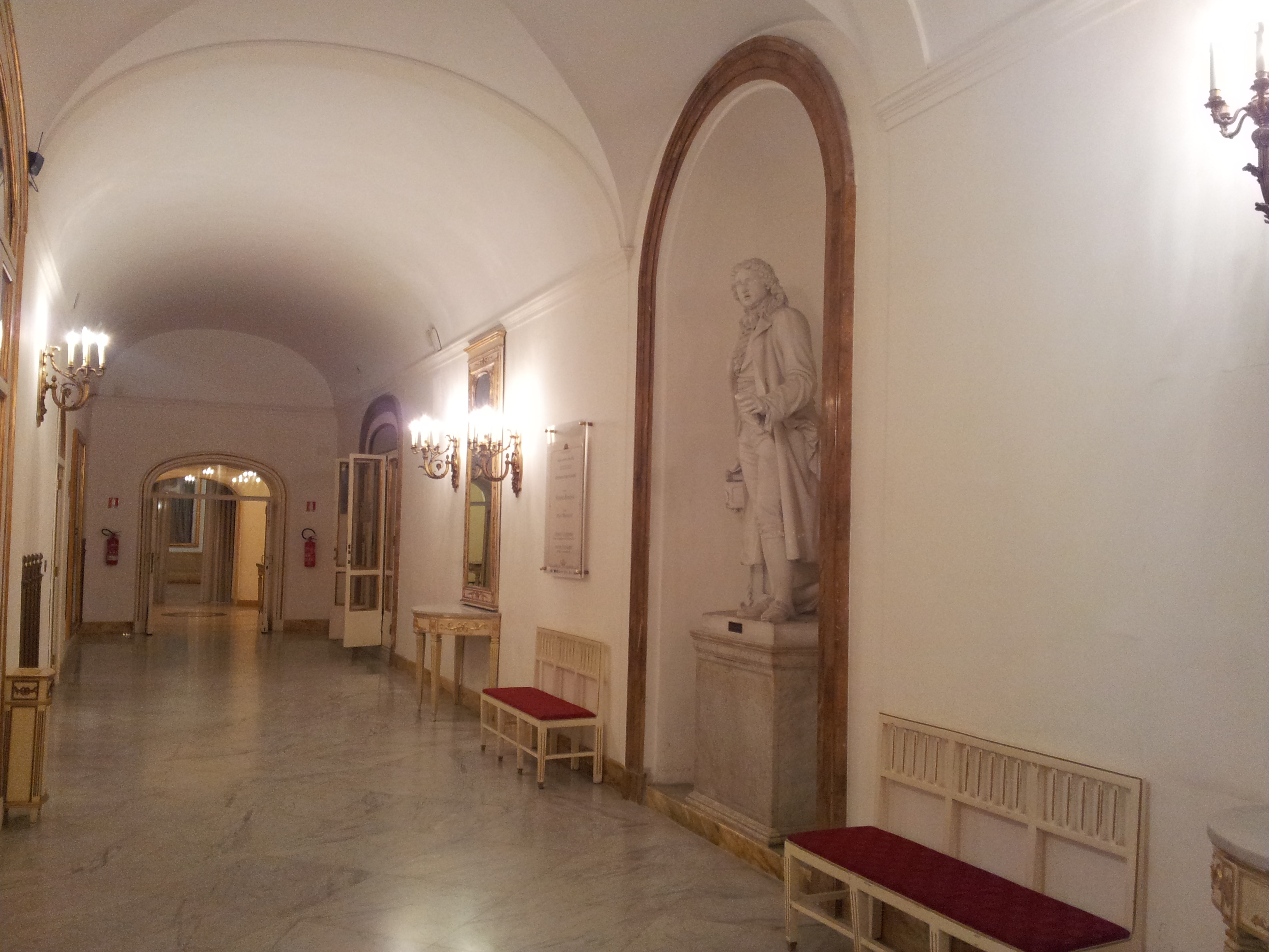 Un corridoio che anticipa l'ingresso alla platea centrale del Real Teatro di San Carlo (Napoli)